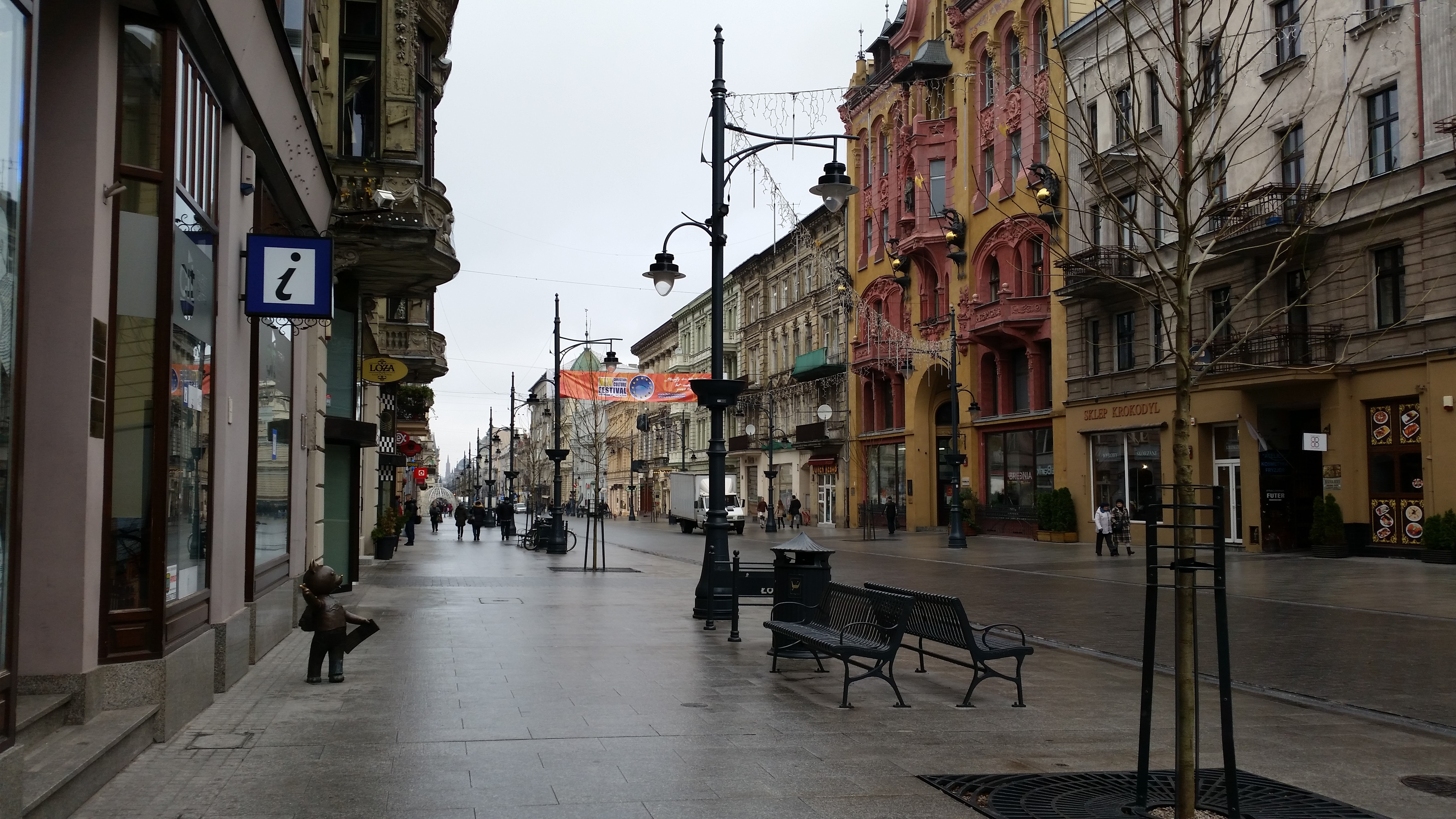 Ulica Piotrkowska w Łodzi w listopadzie 2015